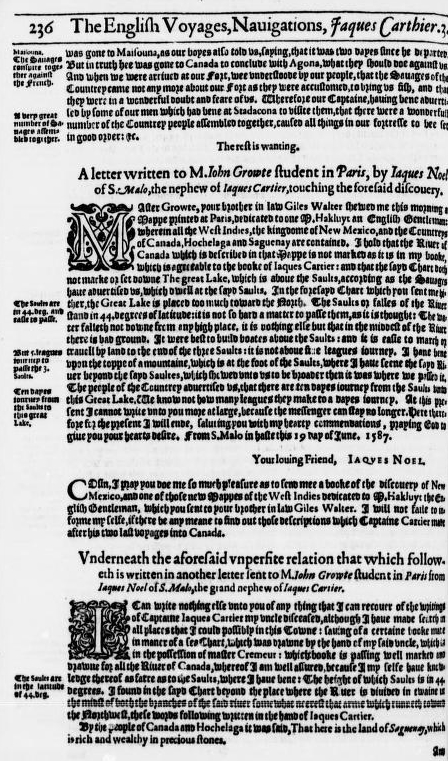 Jacques Noel, letters on Jacques Cartier's third voyage, in Hakluyt, Principal voyages, vol. 3